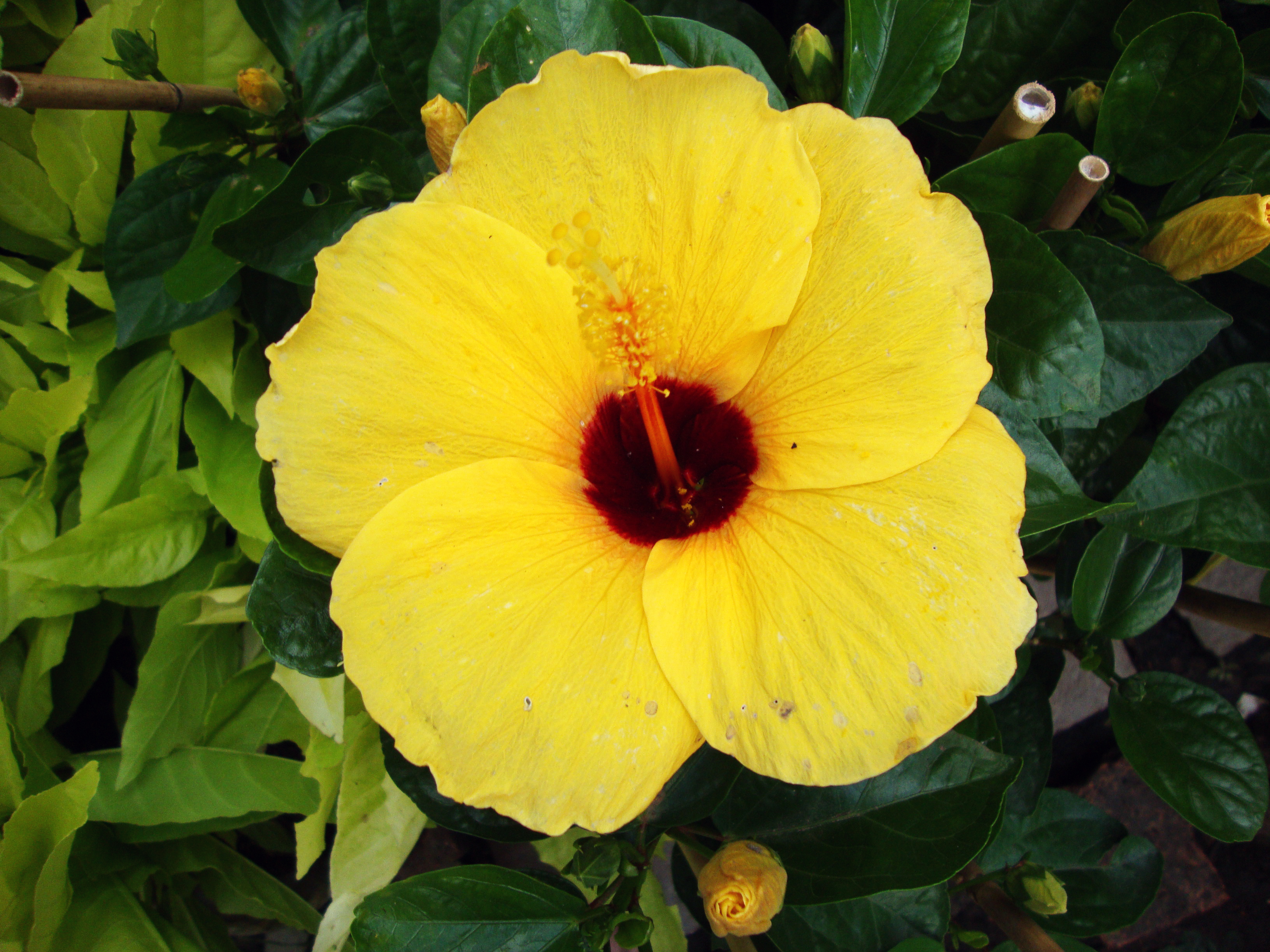 Hibiscus brackenridgei A. Gray, 1854